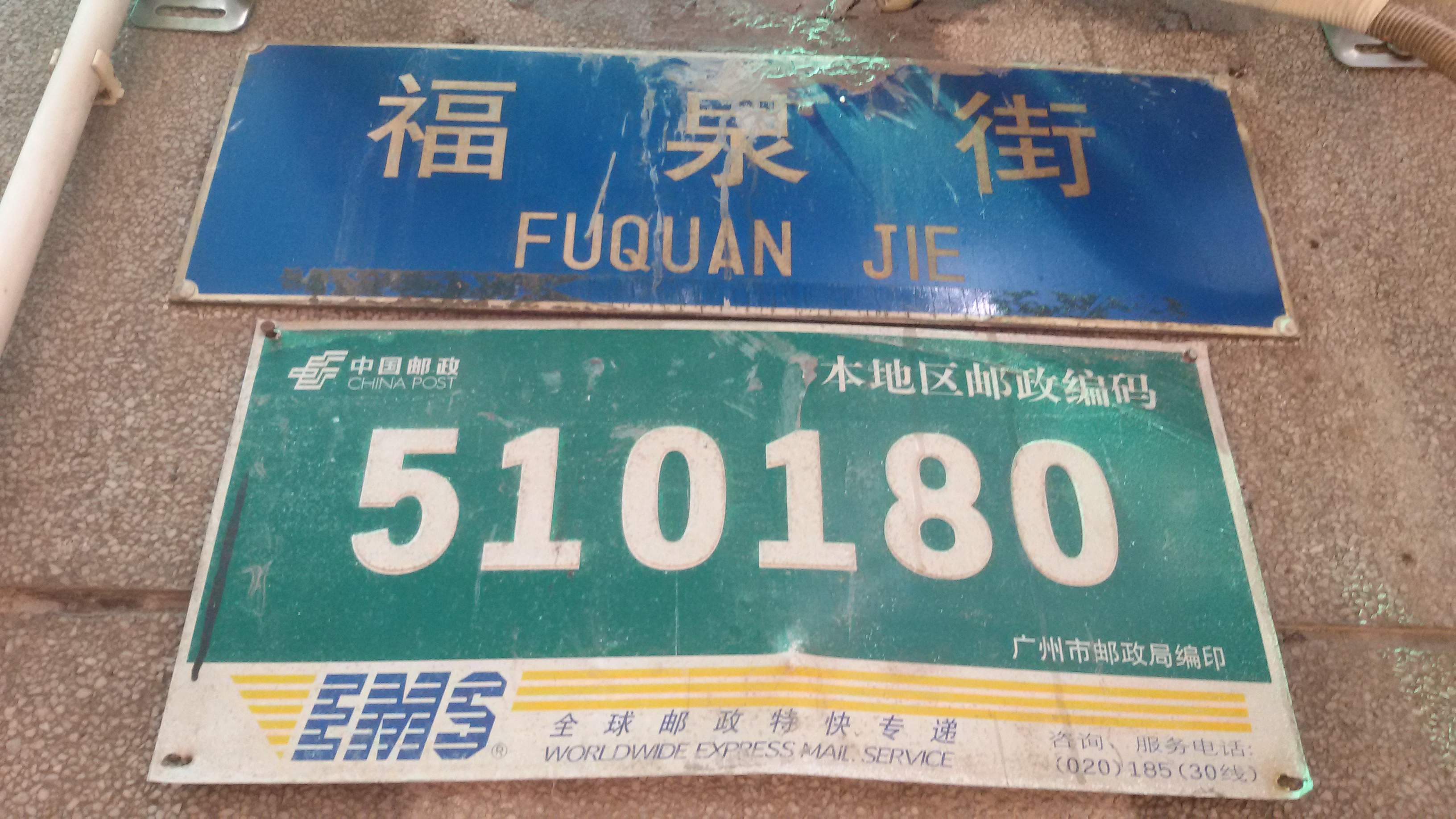 粵語: 福泉街嘅巷牌同佢嘅當地郵政編碼